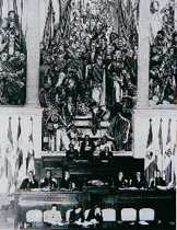 IX Conferencia Panamericana en el Salon Eliptico del Capitolio Nacional, frente al Mural por el Maestro Santiago Martinez Delgado.